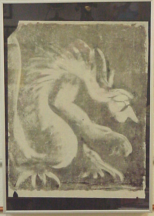 Monotypie mit Ölfarbe auf Glas, mittels Terpentin und Lappen verwaschen und von Hand auf Seidenpapier abgerieben